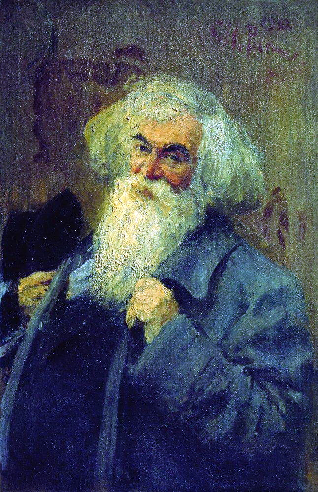 Портрет писателя Иеронима Иеронимовича Ясинского